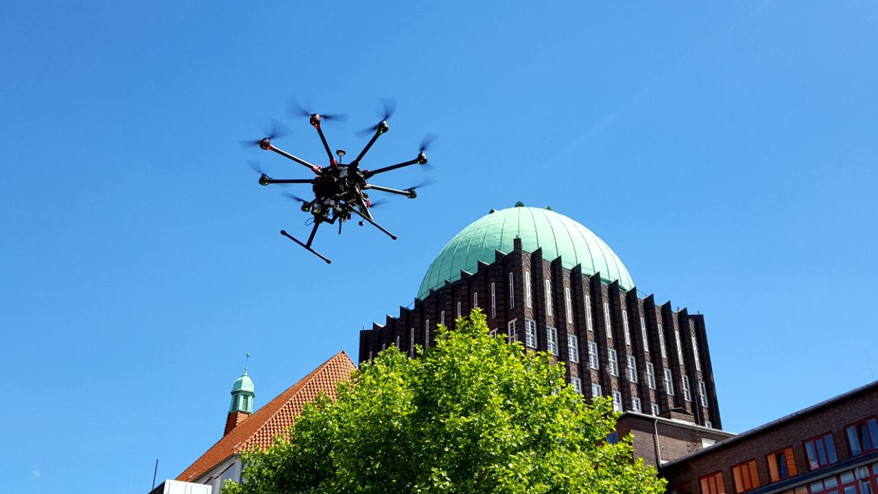 Eigenkonstruktion eines Octocopter der TVN Group für Film- und Fernsehaufnahmen vor dem Anzeiger-Hochhaus.